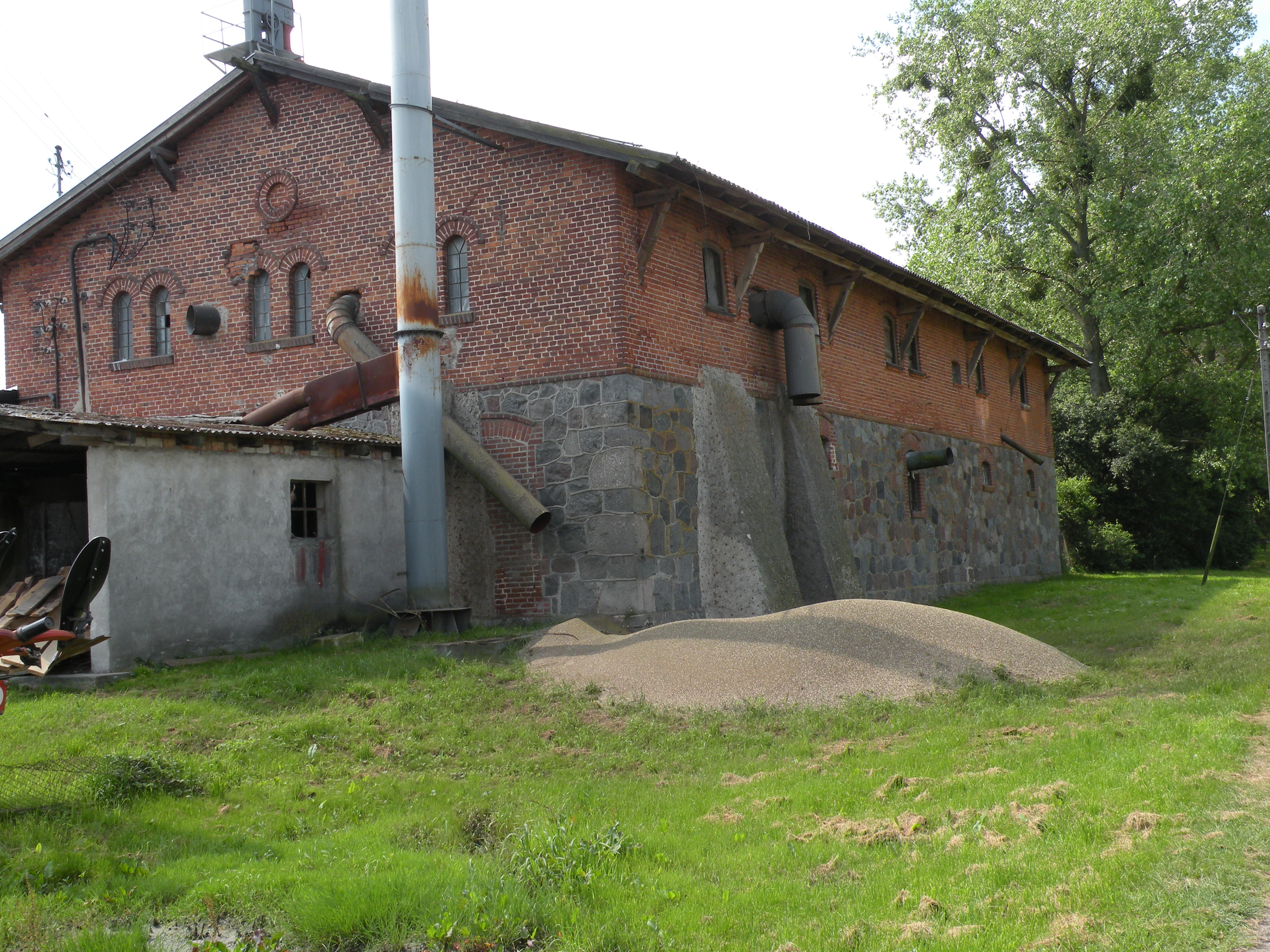 Pudłowiec, gmina Stary Dzierzgoń, zabudowania gospodarcze dawnego dworu